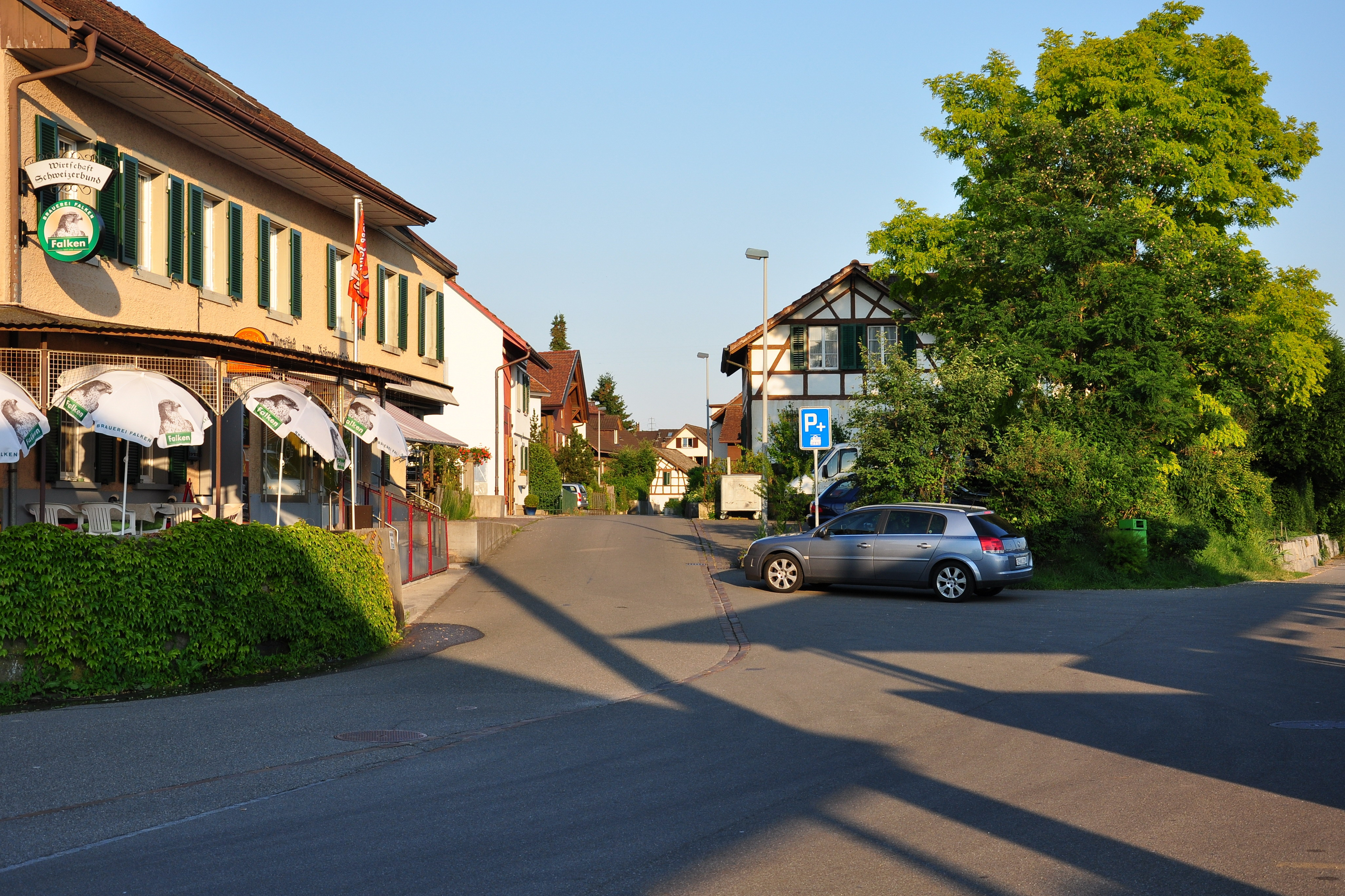 Dachsen (Switzerland)